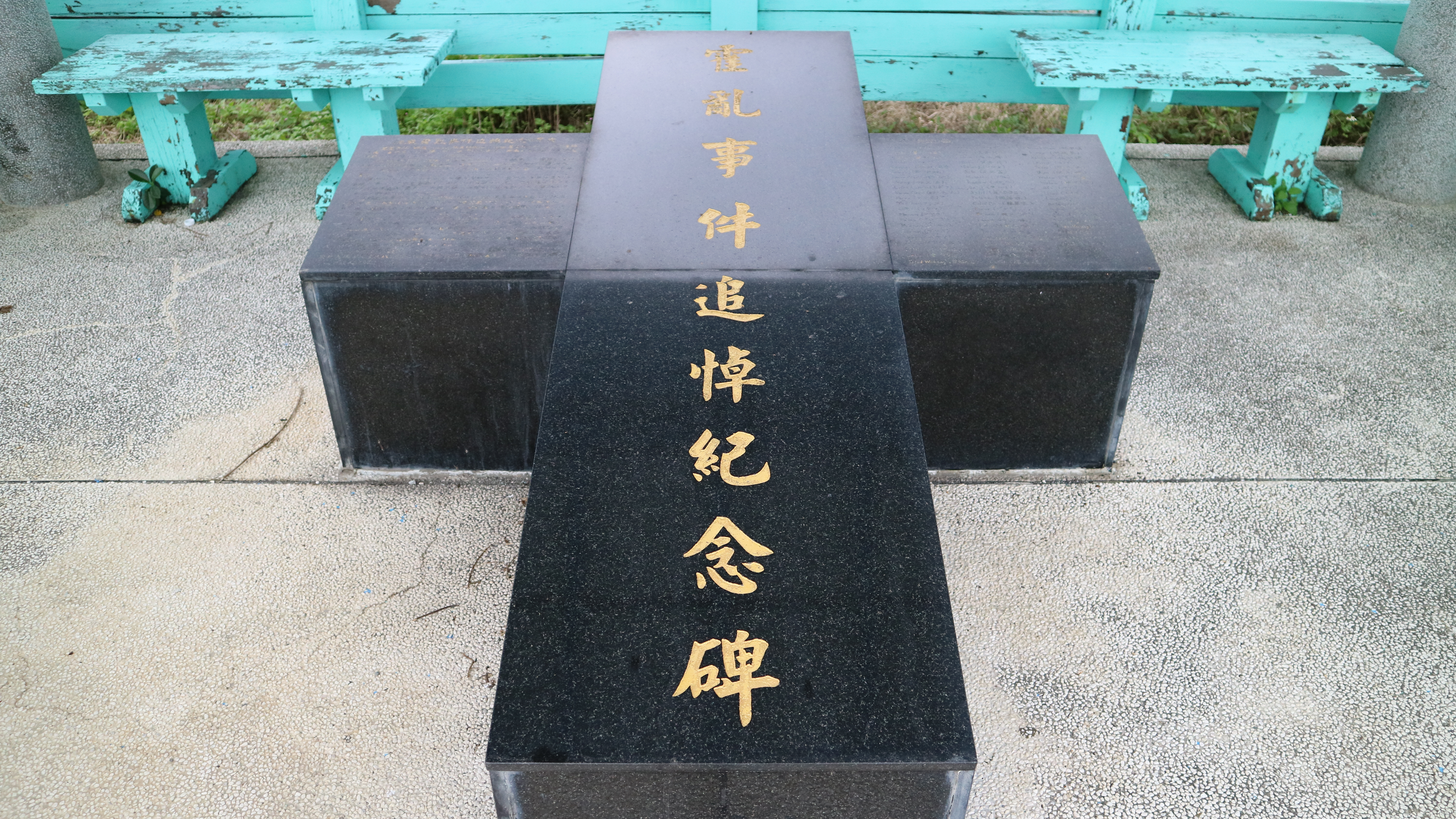 重安霍亂事件紀念碑